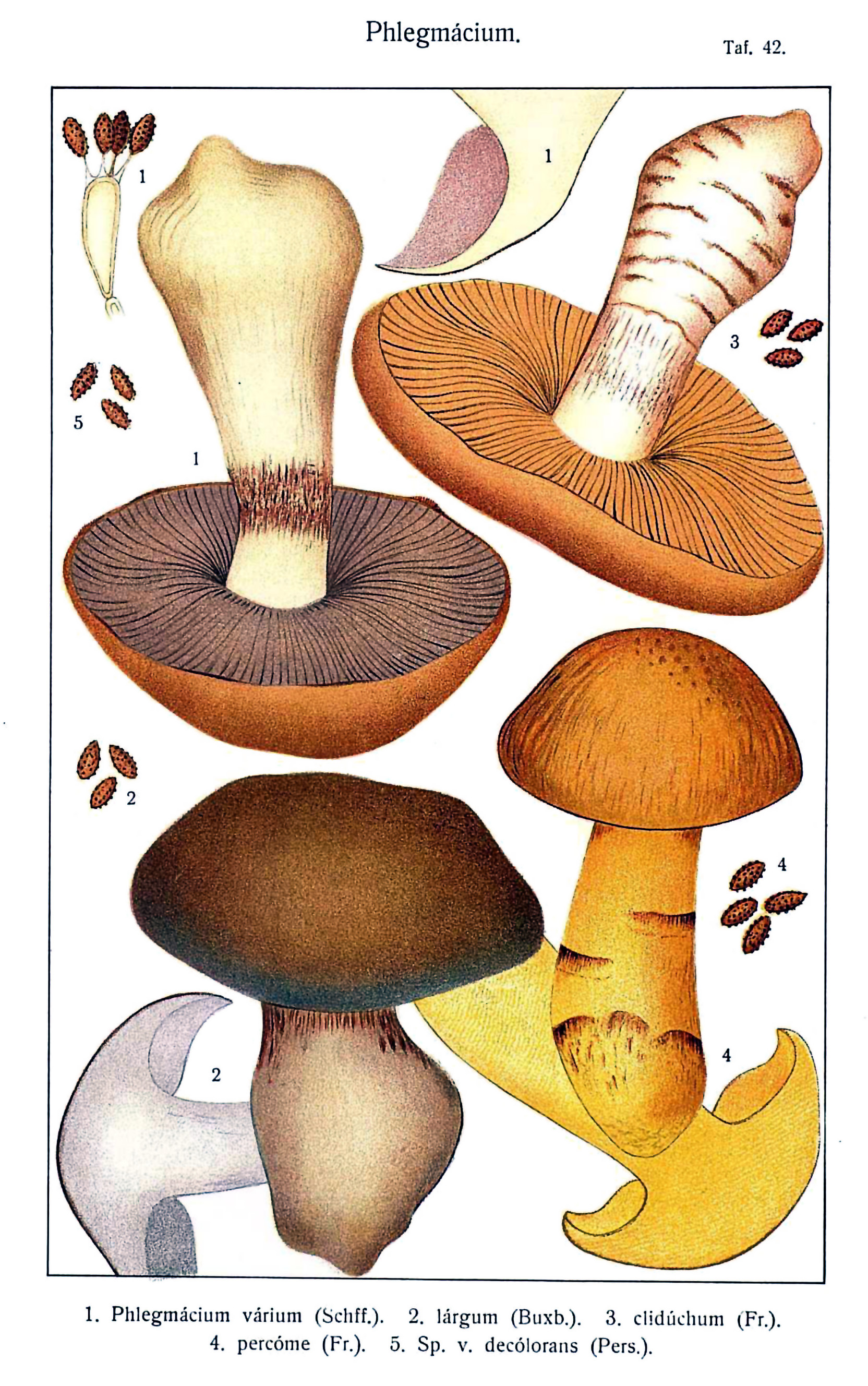 Adalbert Ricken: Die Blätterpilze (Agaricaceae) Deutschlands. (II. Band. Abbildungen), 1915; Tafel. 421. Phlegmácium várium (Schff.). 2. Ph. lárgum (Buxb.). 3. Ph. clidúchum (Fr.). 4. Ph. percome (Fr.). 5. Sp. v. decólorans (Pers.).